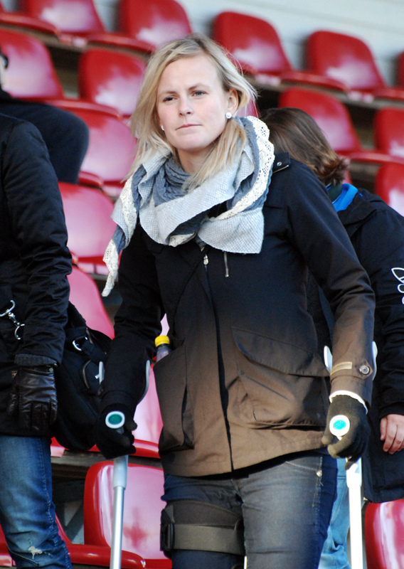 Annica Sjölund